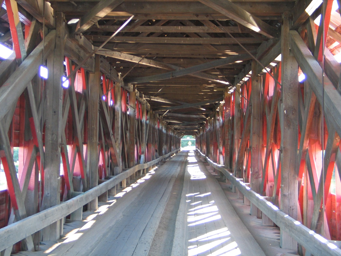 Intérieur du Pont Marchand de Fort-Coulonge, Québec.